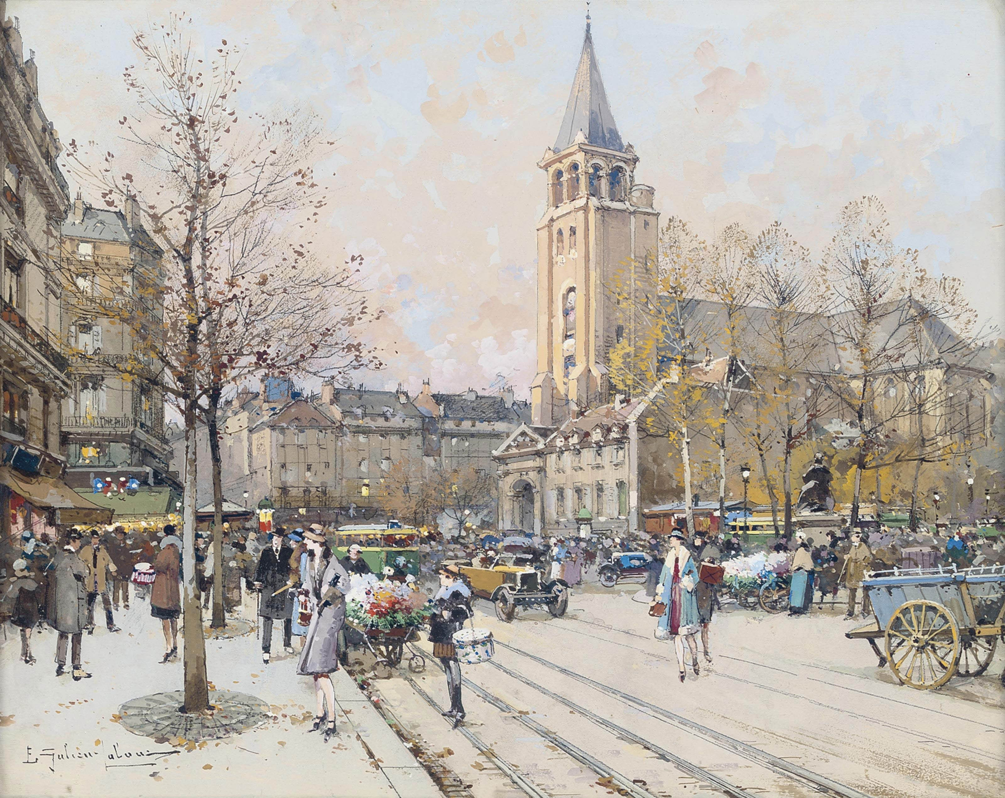 A bustling street at l'Eglise de St-Germain-des-Prés, Paris.